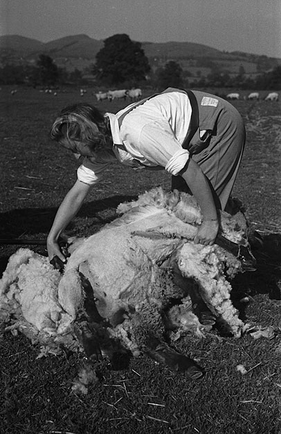 Teitl Cymraeg/Welsh title: Gwyneth Richards, yr unig ferch yn y CFfI i gymeryd rhan mewn cystadlaethau cneifio yng Nghymru Ffotograffydd/Photographer: Geoff Charles (1909-2002) Dyddiad/Date: June 24, 1944 Cyfrwng/Medium: Negydd ffilm / Film negative Cyfeiriad/Reference: (gcc09358) Rhif cofnod / Record no.: 3473143 Rhagor o wybodaeth am gasgliad Geoff Charles yn Llyfrgell Genedlaethol Cymru Ceir mwy o ffotograffau o Gymru a'r Gororau adeg yr Ail Ryfel Byd ar wefan .uk More information about the Geoff Charles Collection at the National Library of Wales More photographs of Wales and the English border during the Second World War can be found at .uk